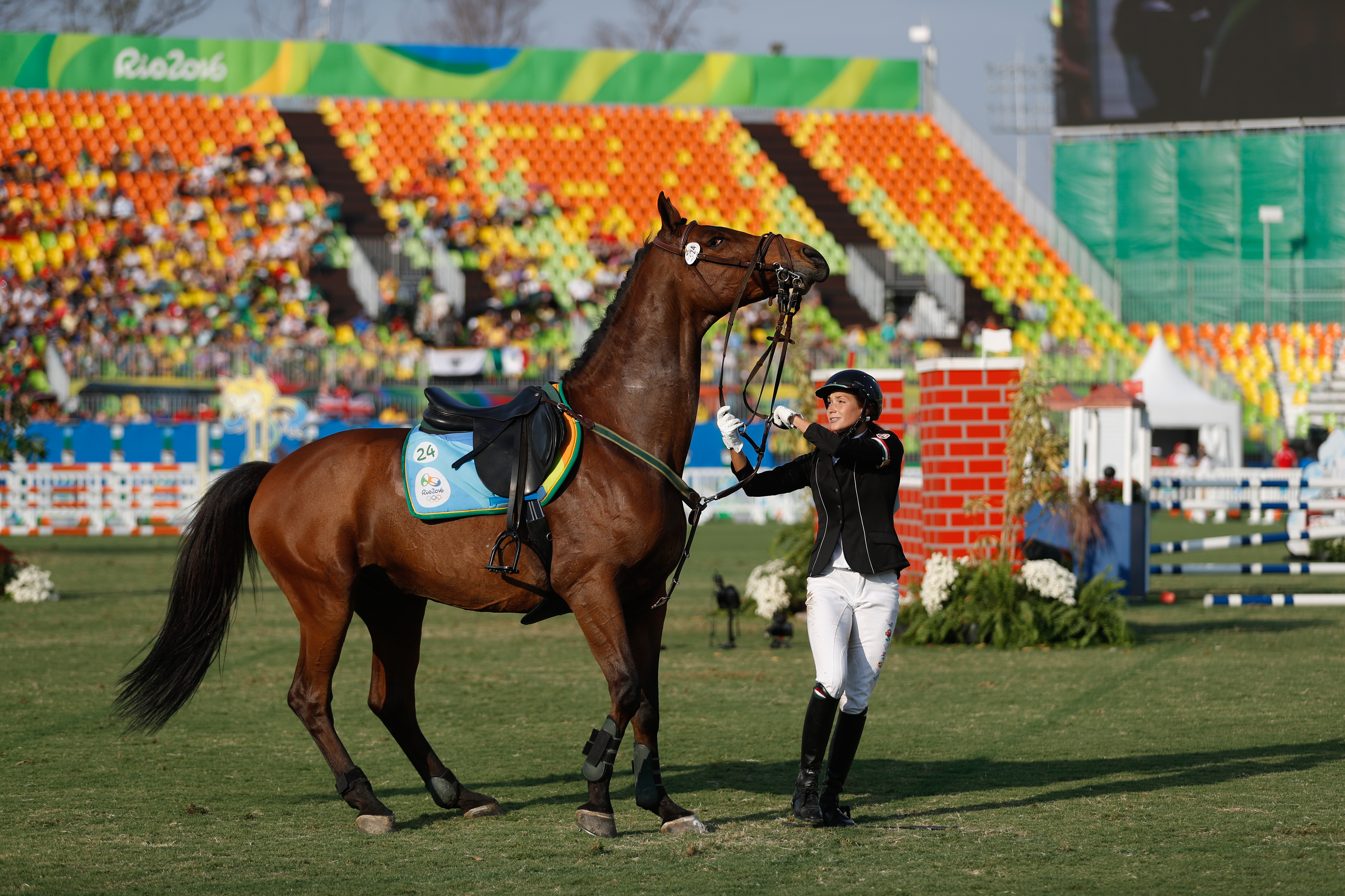 Rio de Janeiro - Cavalo Christino derruba a atleta húngara Zsofia Foldhazi na final do pentatlo moderno dos Jogos Olímpicos Rio 2016 no Estádio de Deodoro (Fernando Frazão/Agência Brasil)